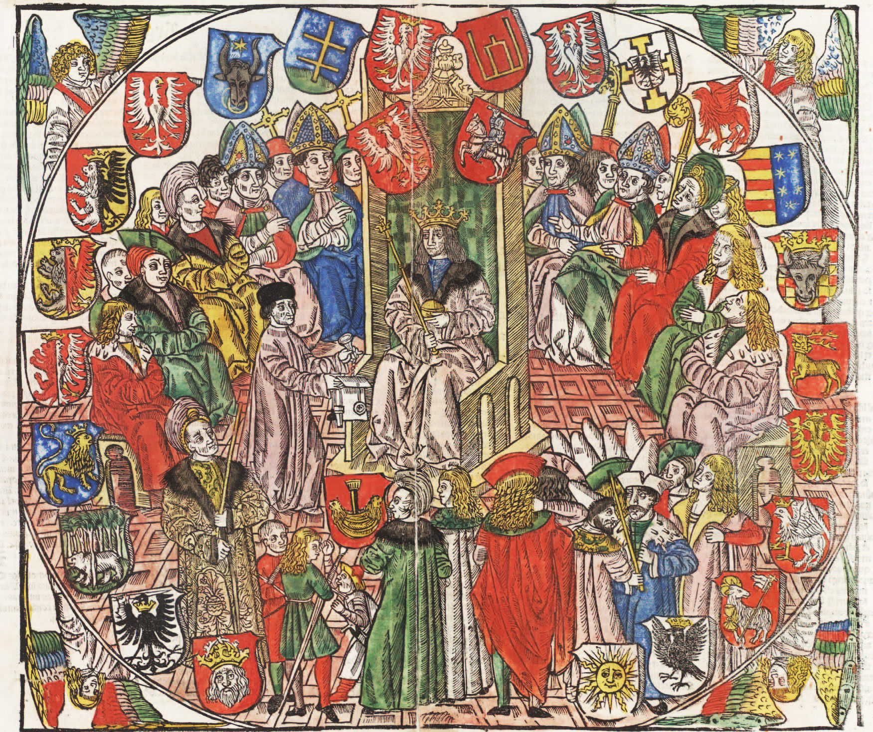 Беларуская (тарашкевіца): Вялікі князь Аляксандар (Alaksandar) на сойме. Размаляваны дрэварыт з "Статуту" Я. Ласкага. Кракаў, 1506